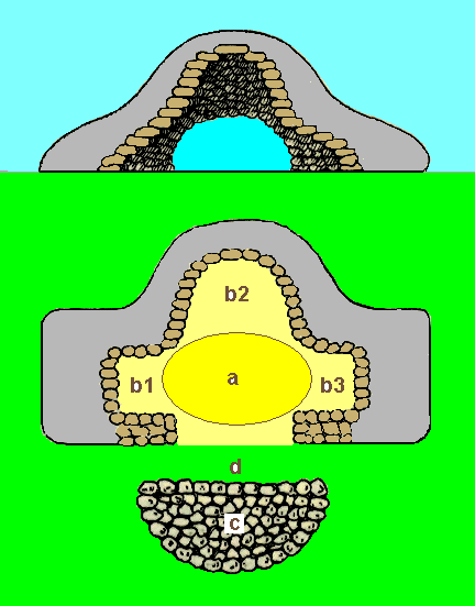 Kuppelbau Hebriden